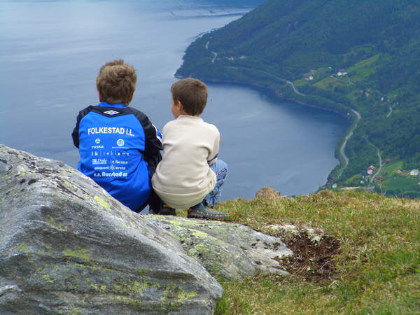 Folkestad i Volda: Bildet viser Mathias Kongsvoll og Martin Holte som ser ut over Folkestad og den vakre naturen rundt.